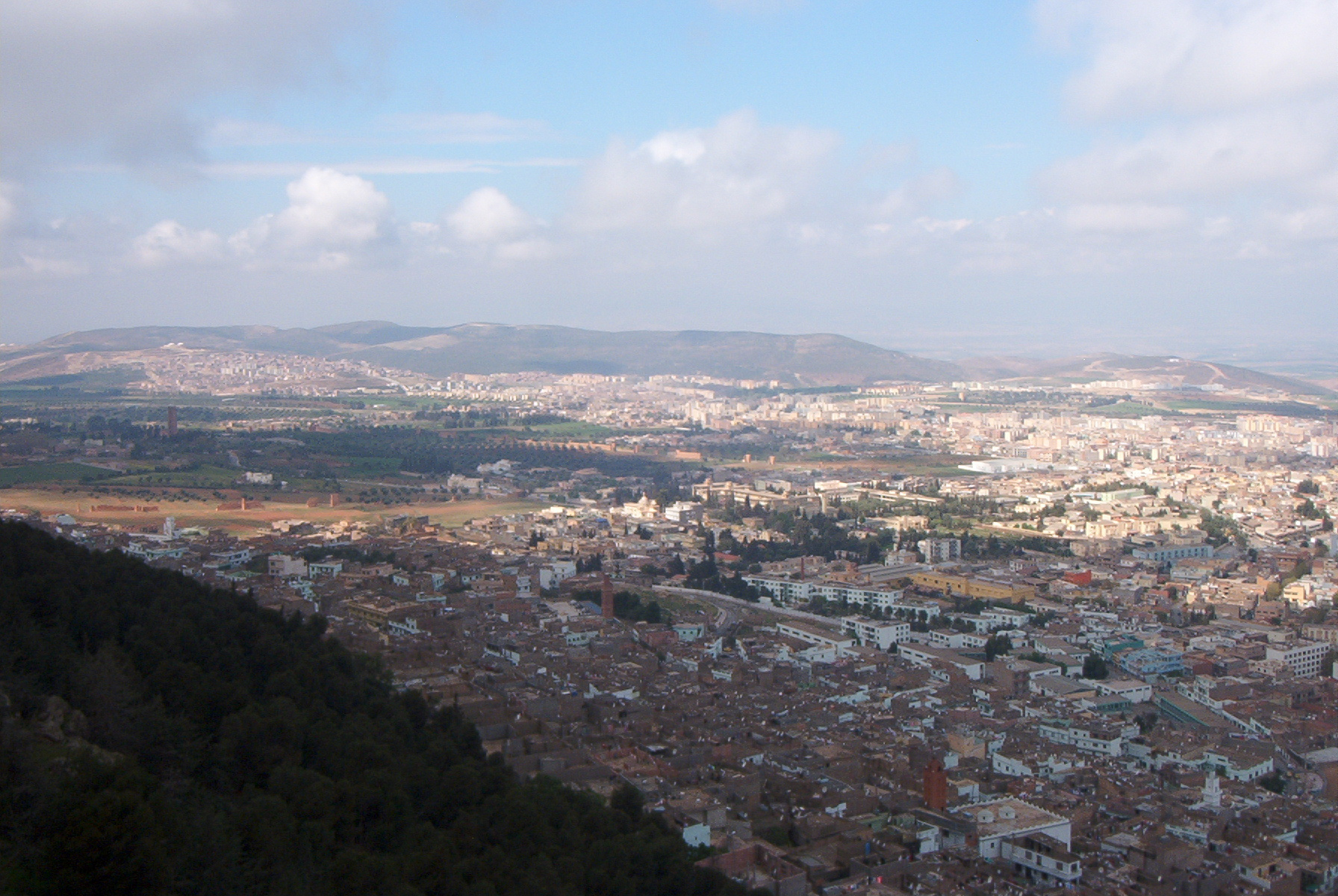 Tlemcen et Mansourah vues du Plateau Lalla setti